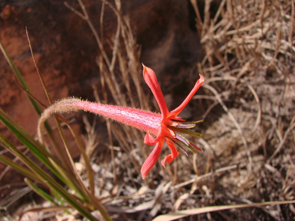 Barbacenia umbrosa - VELLOZIACEAE - Parque Estadual do Biribiri - Serra do Espinhaço - Diamantina - Minas Gerais - Brasil.